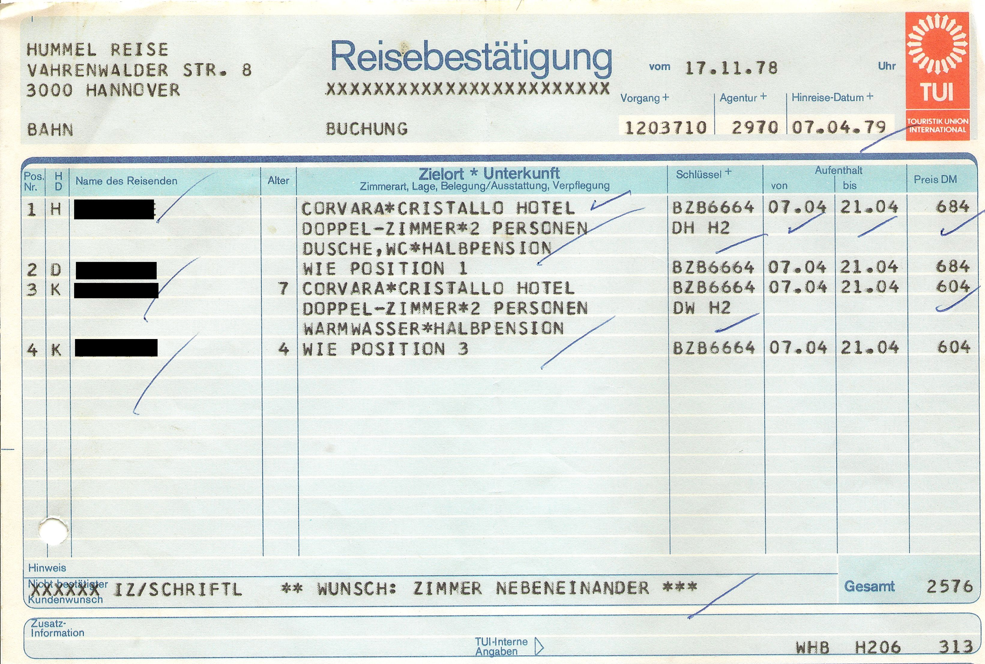 TUI-Reisebestätigung Corvara 1979